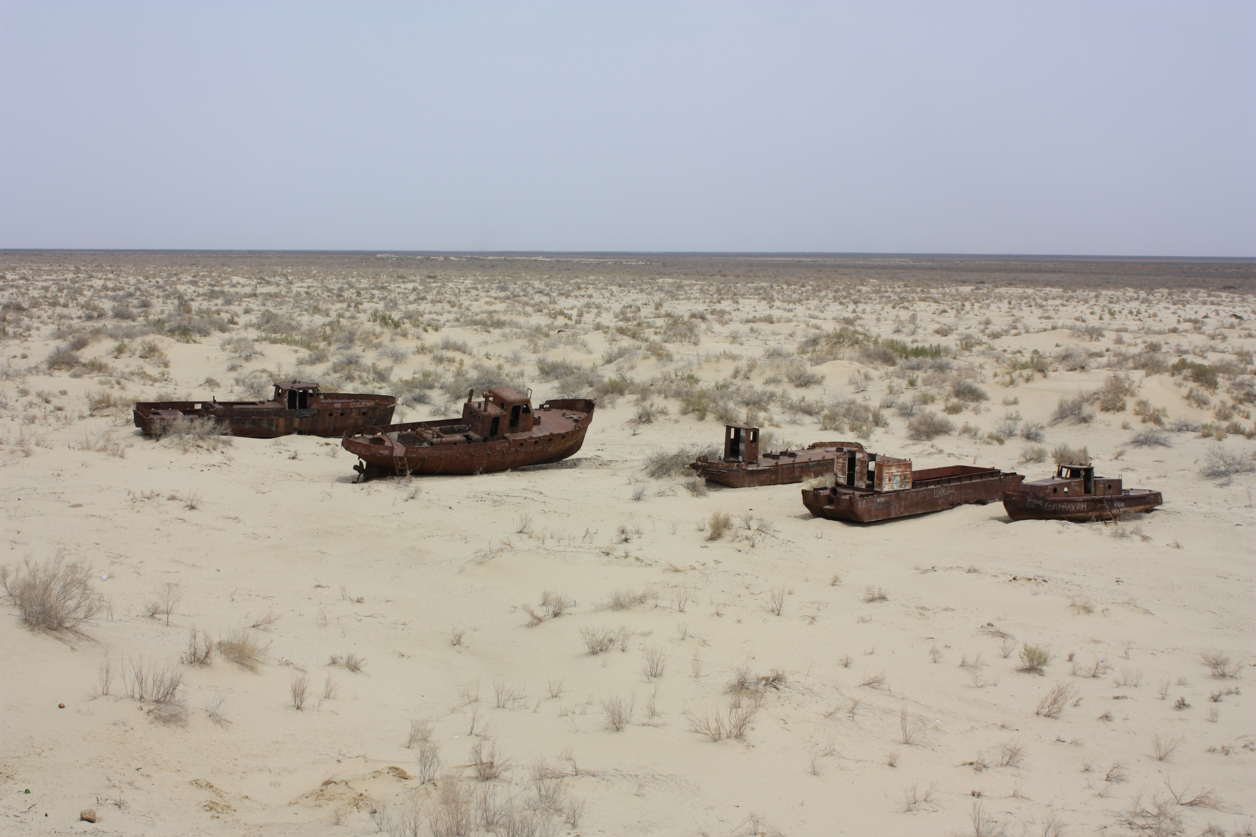 Moynaq